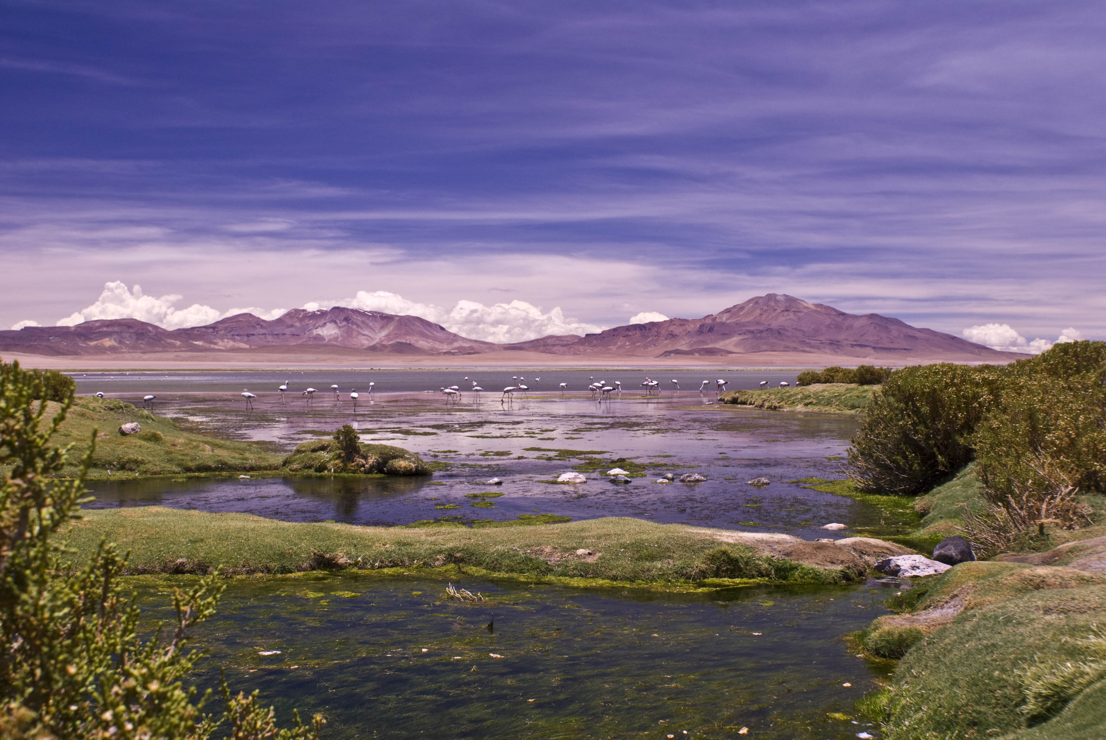 El Salar de Tara se ubica a 133 kilometros de San Pedro de Atacama a una altura superior a los 4000 metros.